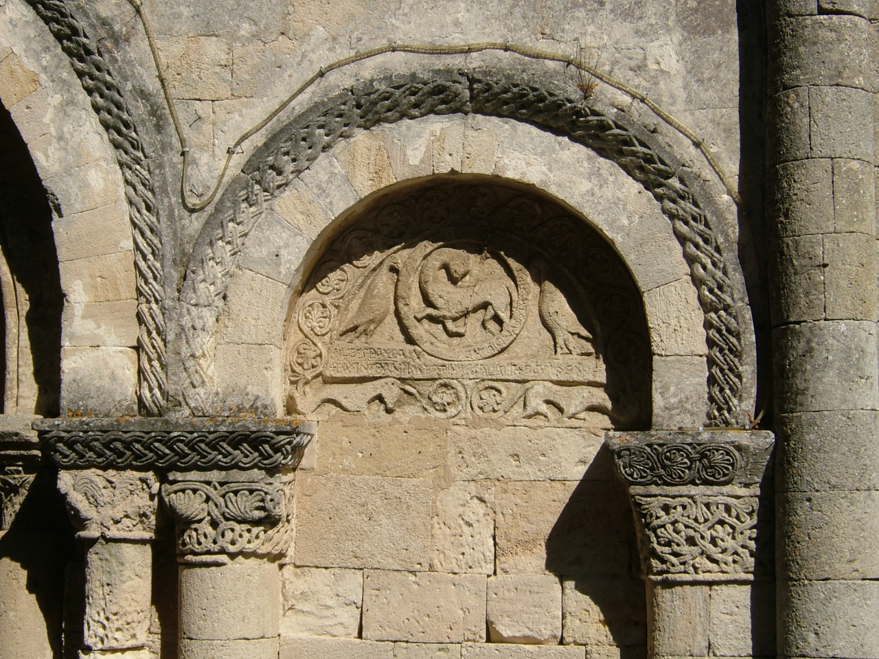 Tauriac, Gironde (France); détails de l'arcature à droite du porche de l'église.